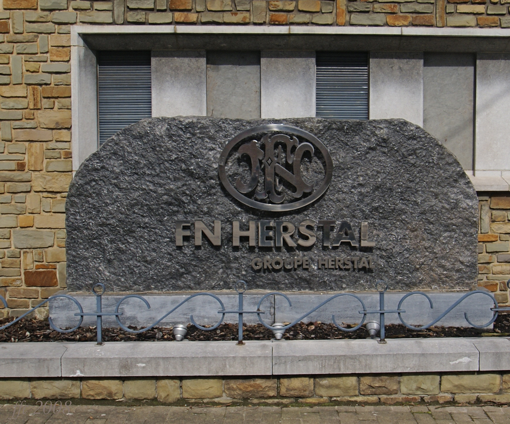 Herstal (Belgium) Logo weapon factory Groupe FN Logotip de la fàbrica d'armes Groupe FN Logo du groupe FN à l'entrée principale